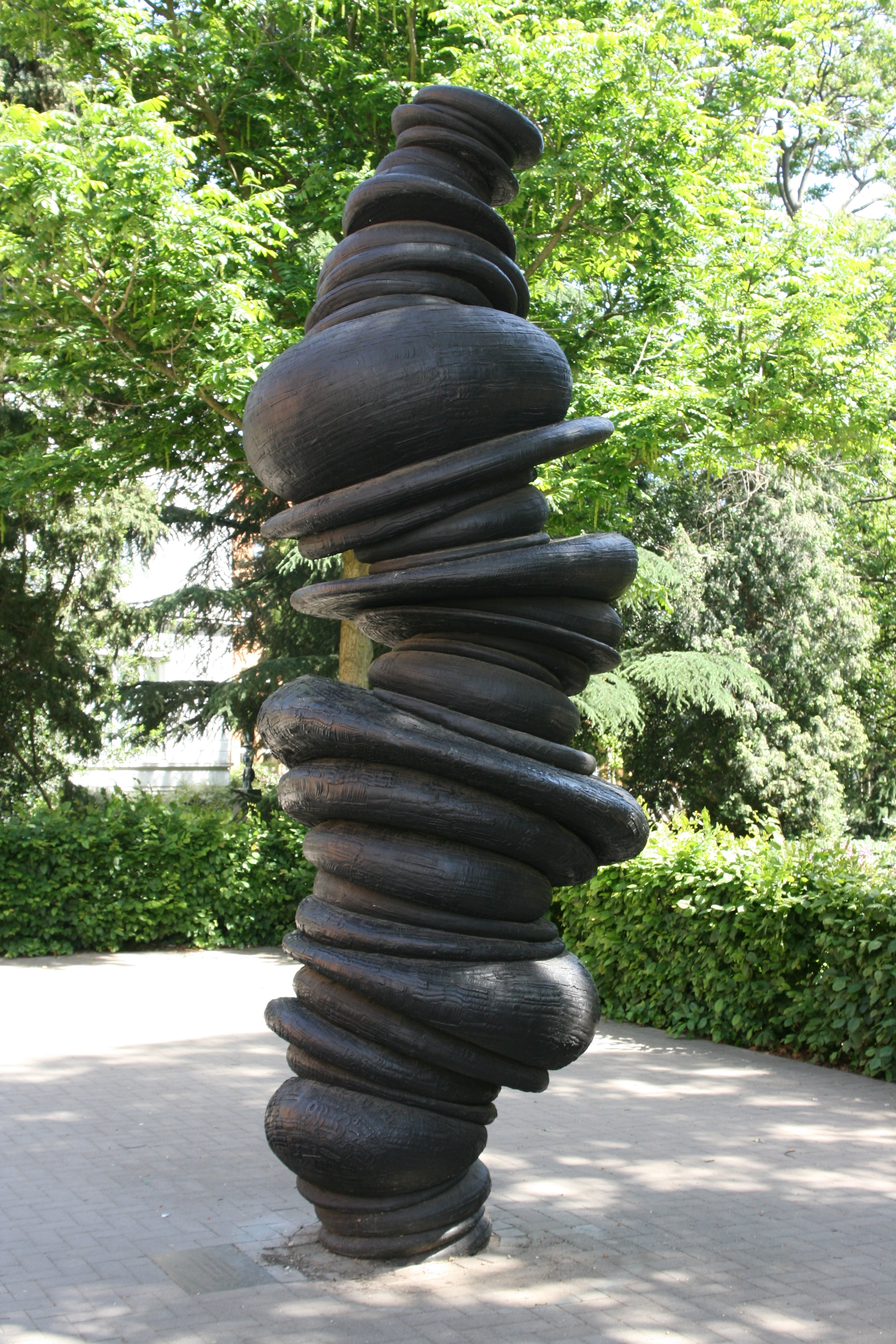 „Wirbelsäule - the articulated column“ von Tony Cragg, Rathausmarkt in Viersen